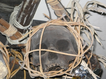 Kopfjagd-Trophäenschädel (iba: Pala Antu) der Iban, fotografiert in einem Iban-Langhaus in der Betong-Division in Sarawak, Malaysia. Der Schädel ist etwa 100 Jahre alt.